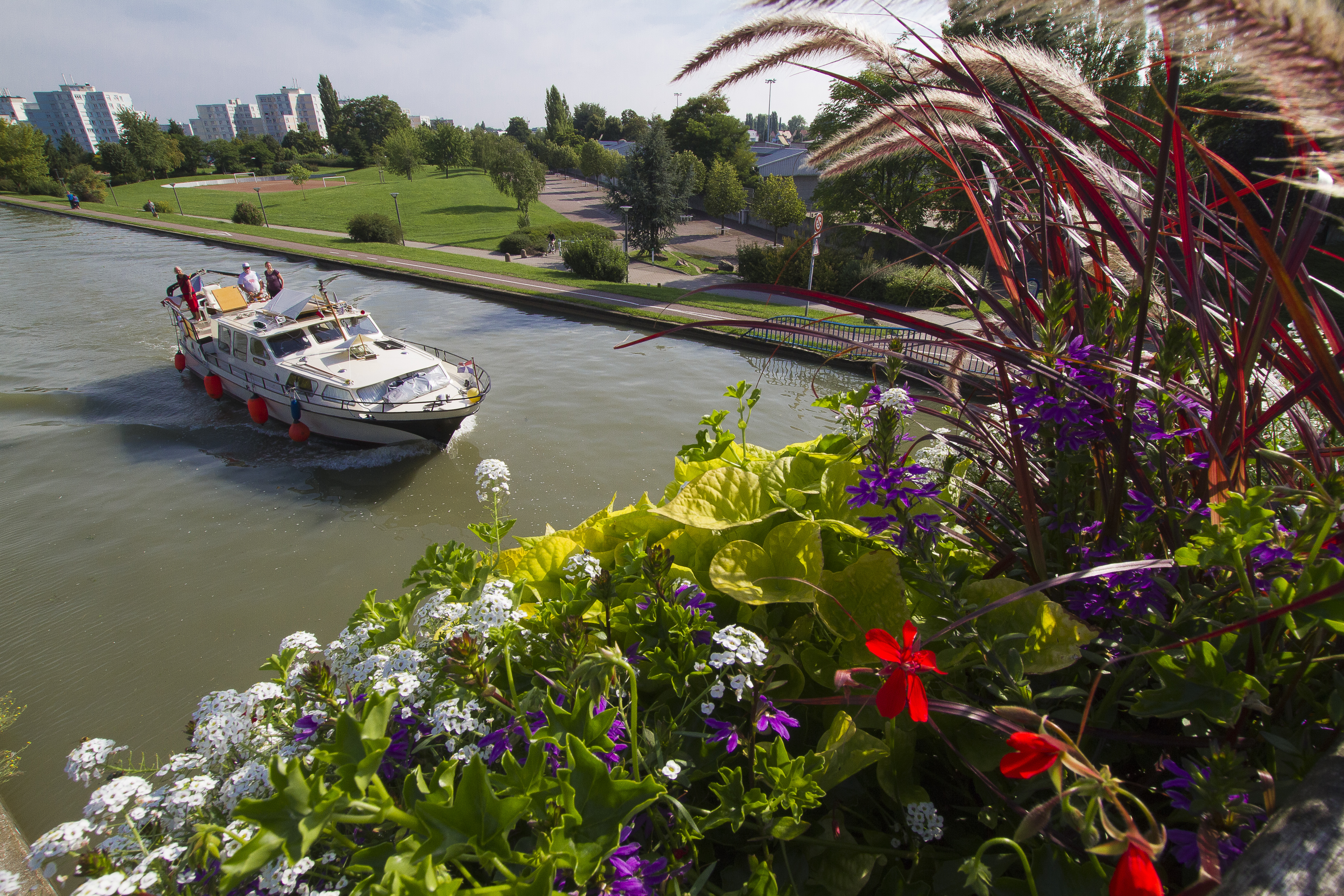 Canal de la Marne au Rhin à Bischheim, Alsace, France